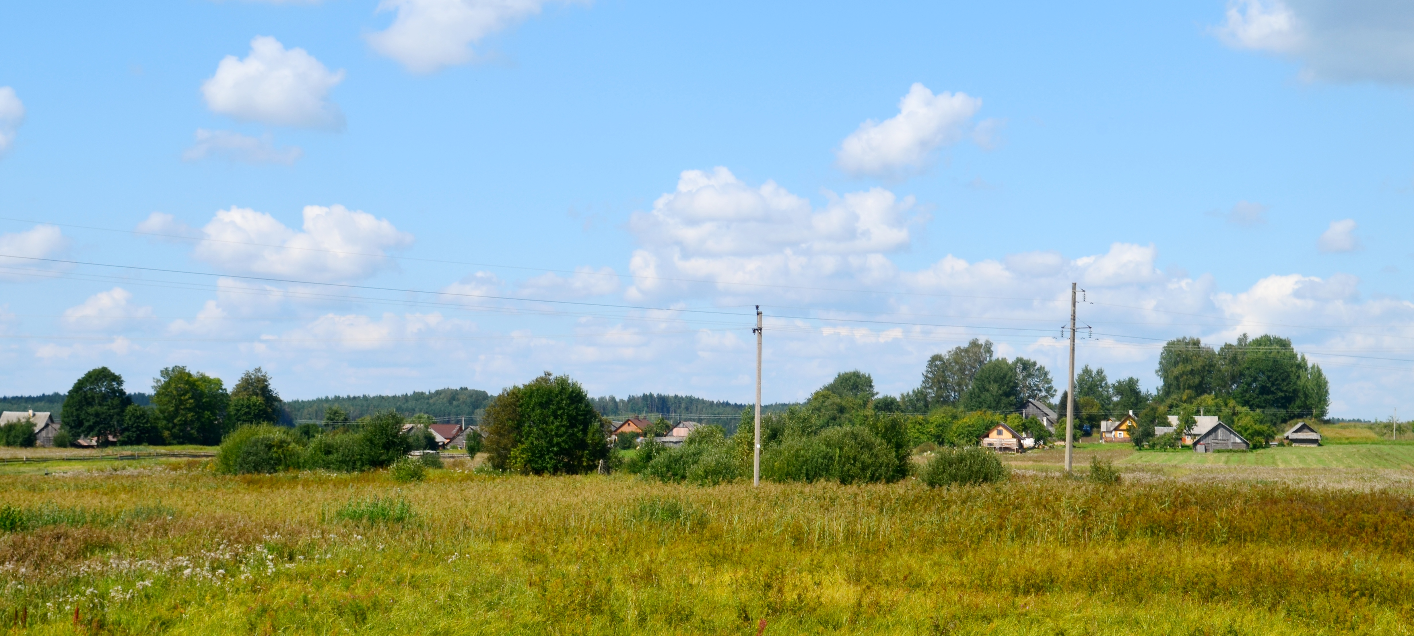 Pupiškės, Šalčininkų raj.